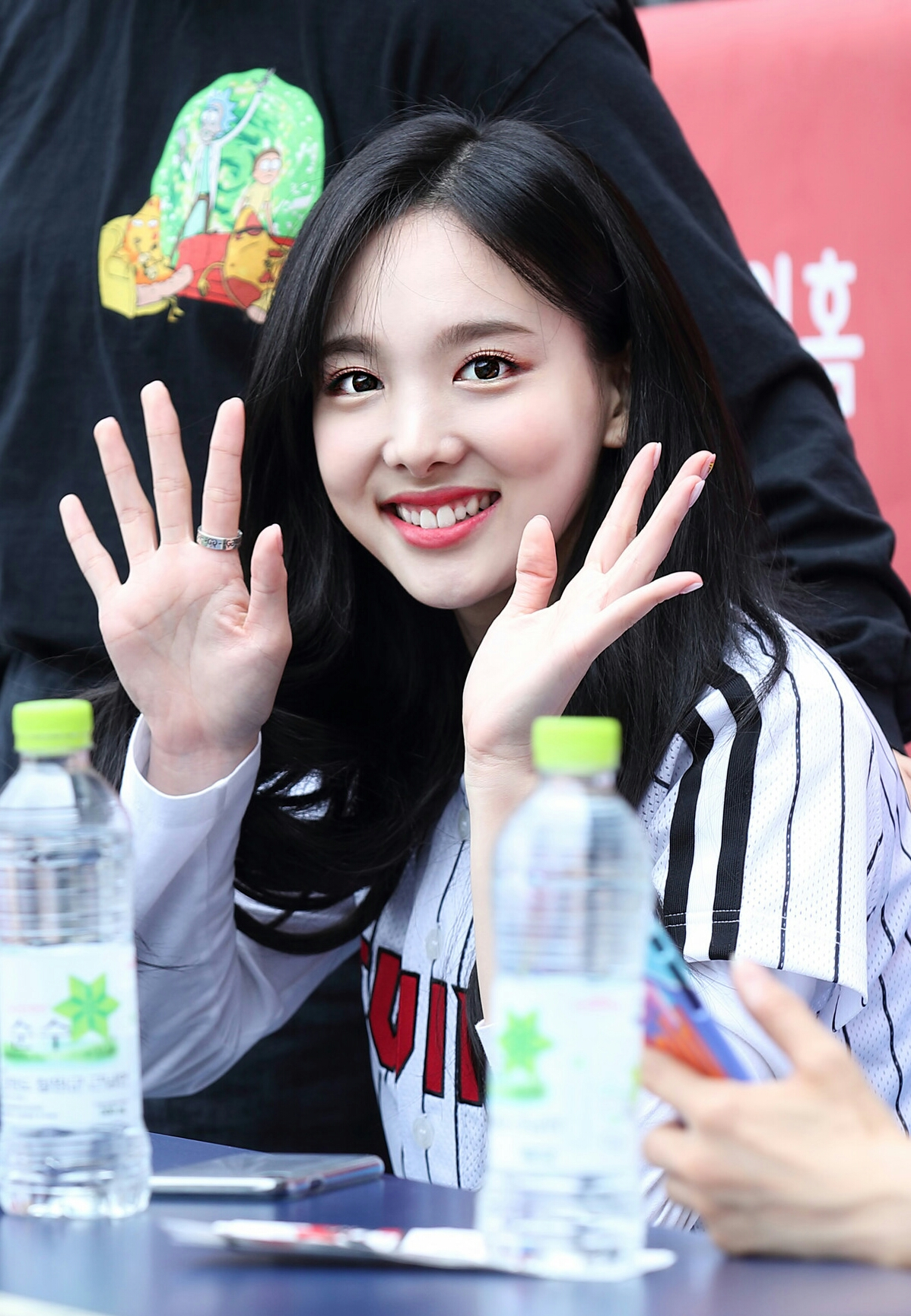 Im Na-yeon no jogo LG Twins vs KIA Tigers em 1° de abril de 2018